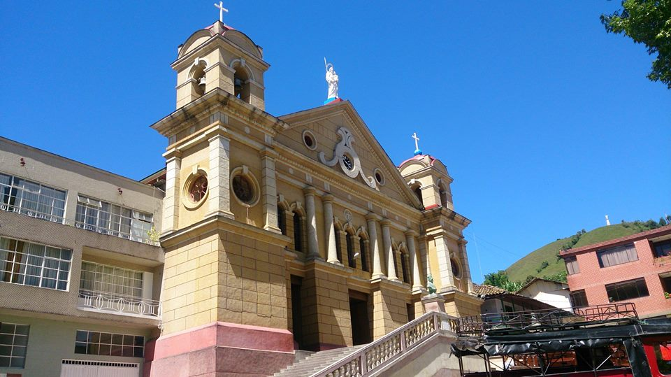 Esta fotografía fue tomada en el municipio colombiano con código 17513.